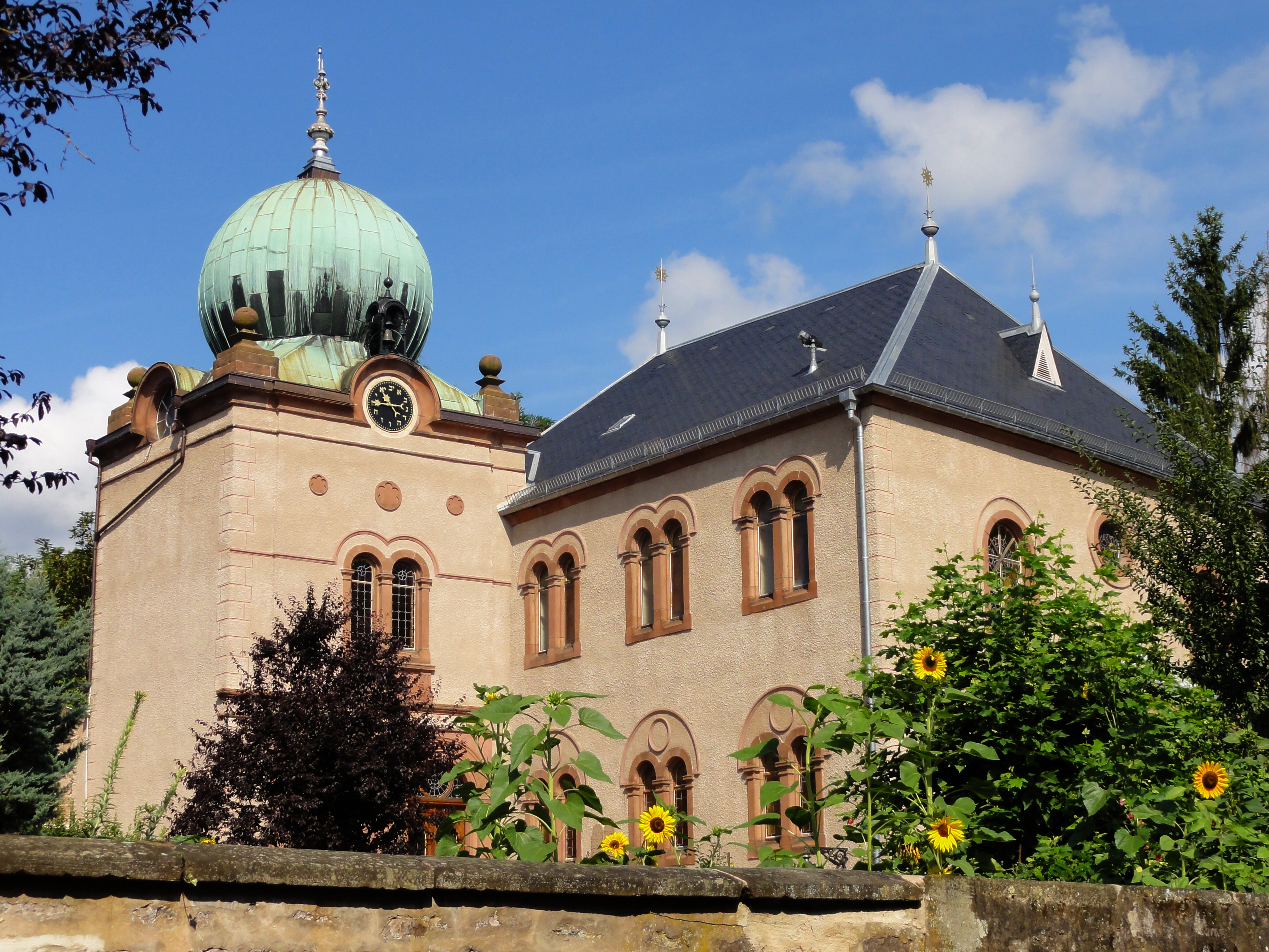 Alsace, Bas-Rhin, Ingwiller, Synagogue (XIXe), 3-4-5 cour du Château (IA67009766).